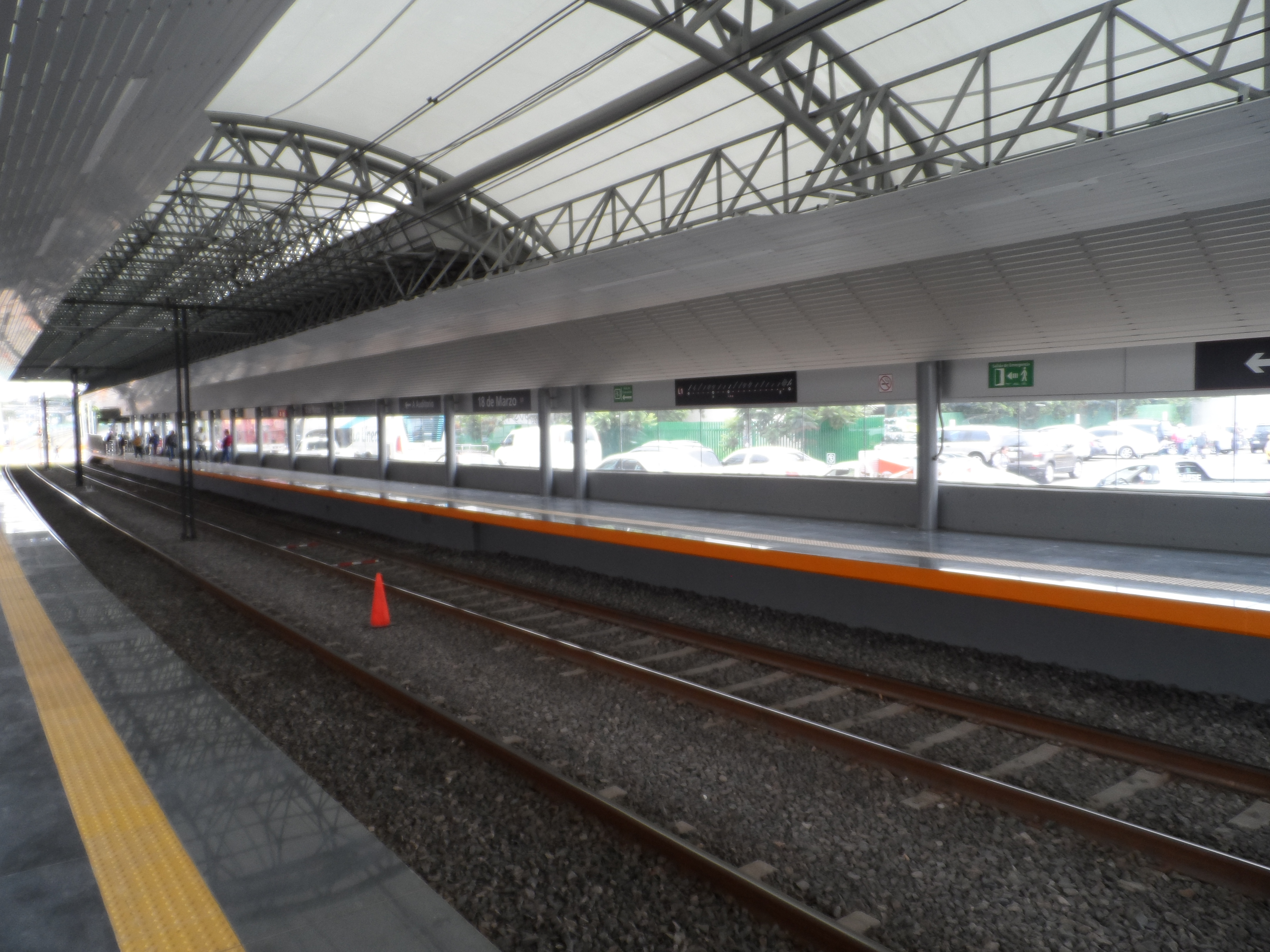 Andenes de la estación "18 de Marzo" de la Línea 1 del Tren Ligero de Guadalajara.